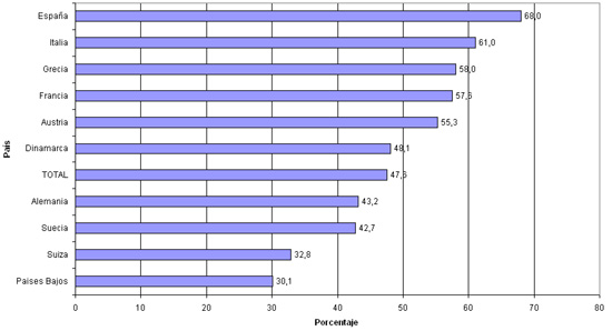 evolución de la jubilación europea